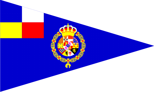 Bandera del Real Club Nautico de Barcelona